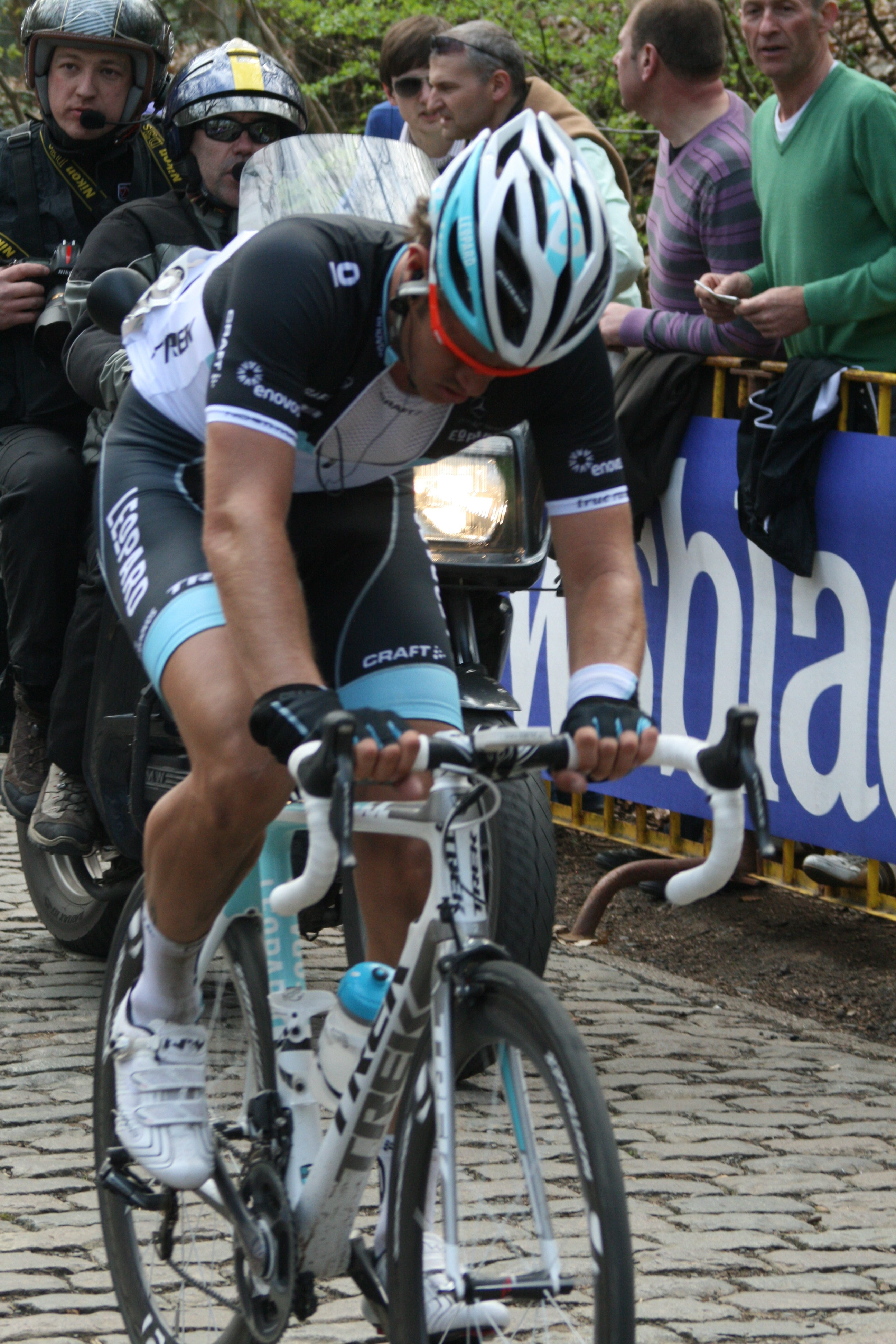 Gand-Wevelgem 2011, mont Kemmel, Wouter Weylandt